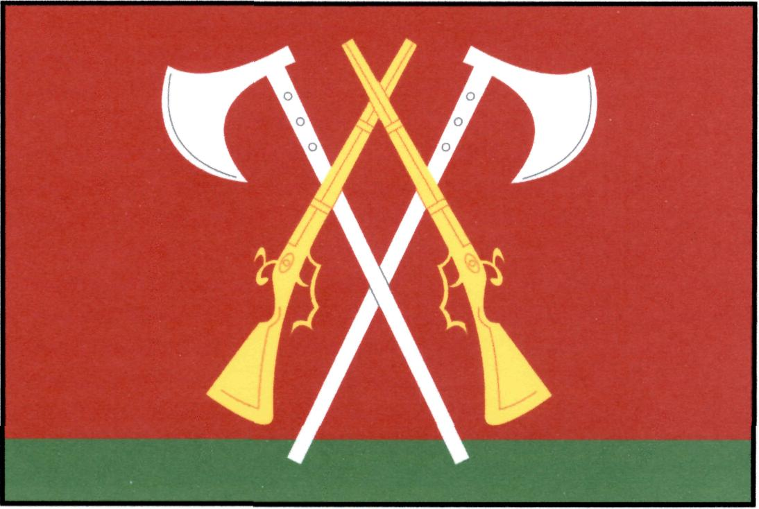 Vlajka obce Stráž (okres Domažlice)